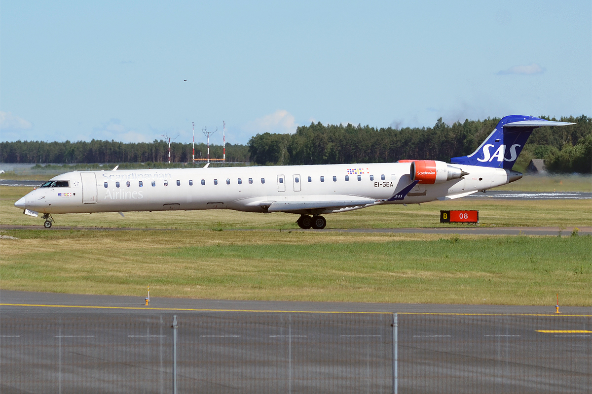 SAS, EI-GEA, Bombardier CRJ-900LR